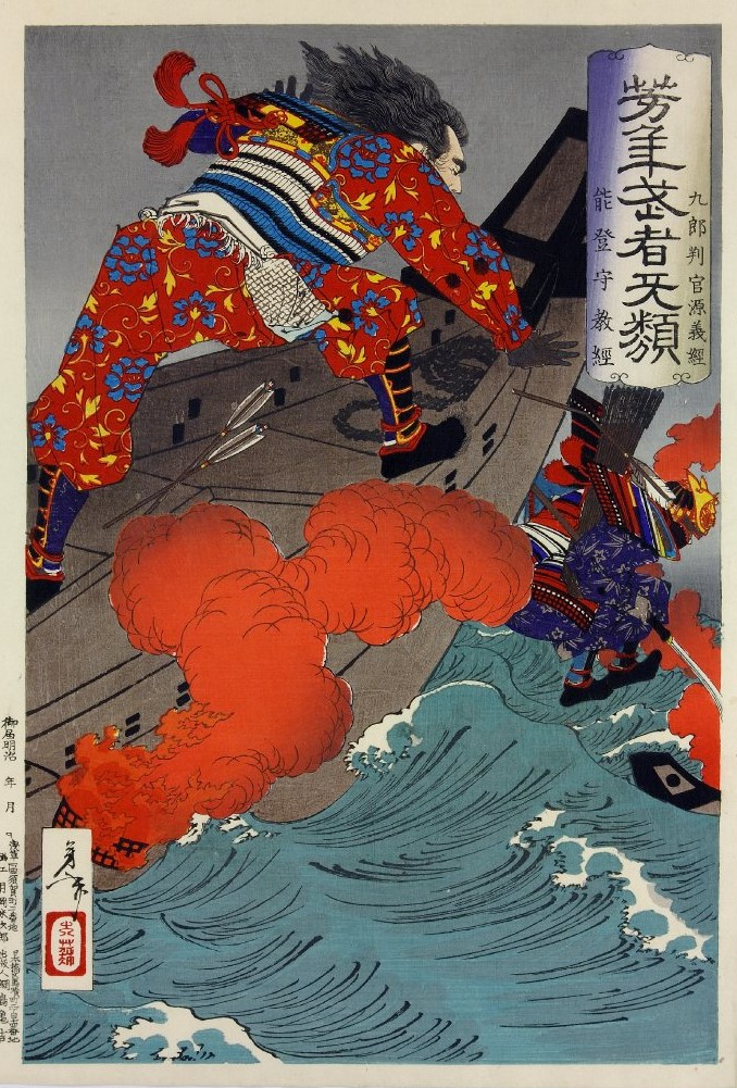 九郎判官源義経 能登守平教経 月岡芳年画「芳年武者无類」。壇ノ浦の戦いでの源義経の八艘飛び伝説を描いたもの。左手に、追う教経、右下に、逃げる義経が描かれている